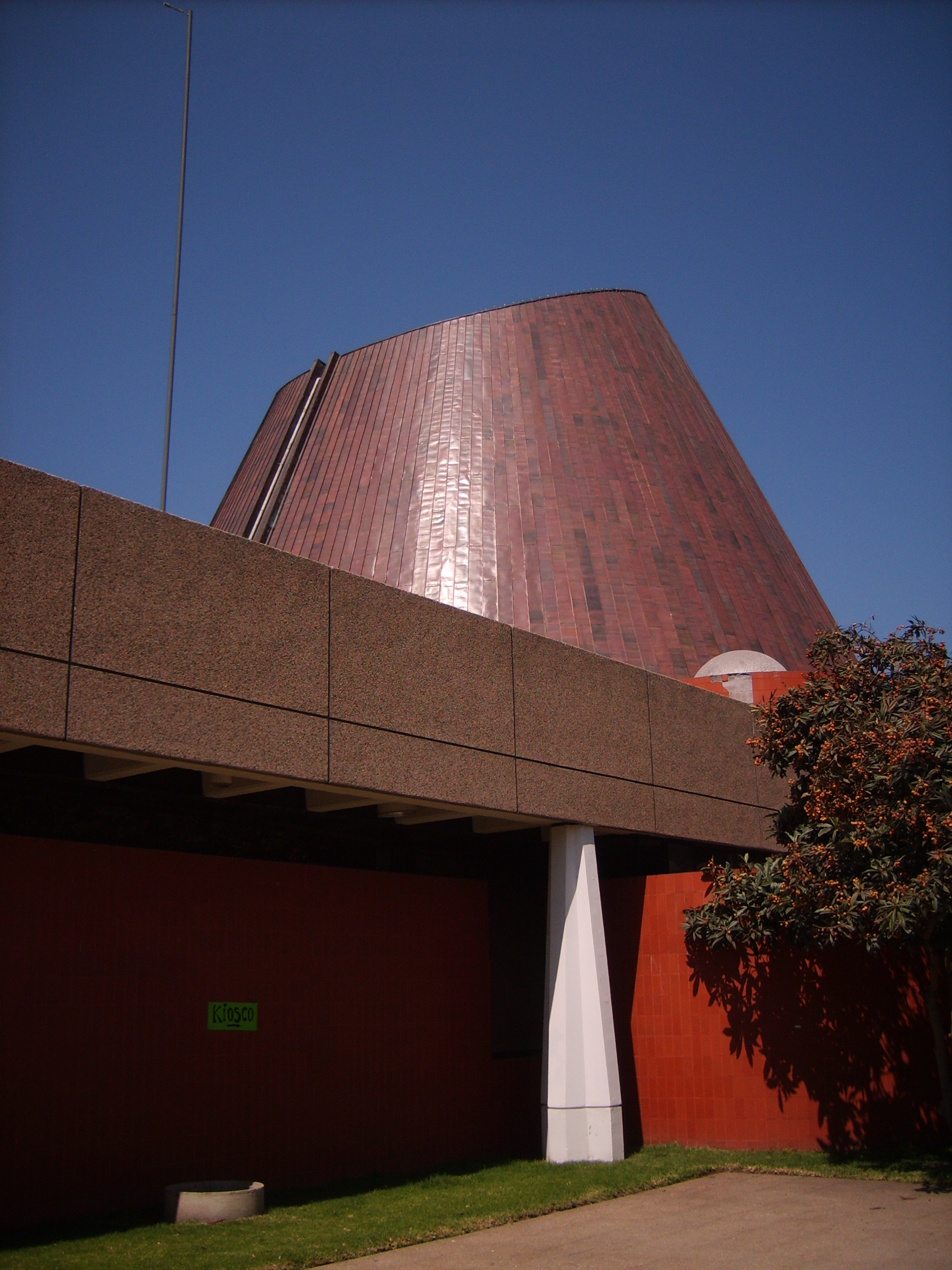 El Planetario de la Universidad de Santiago de Chile (USACH). 22 de noviembre de 2008.